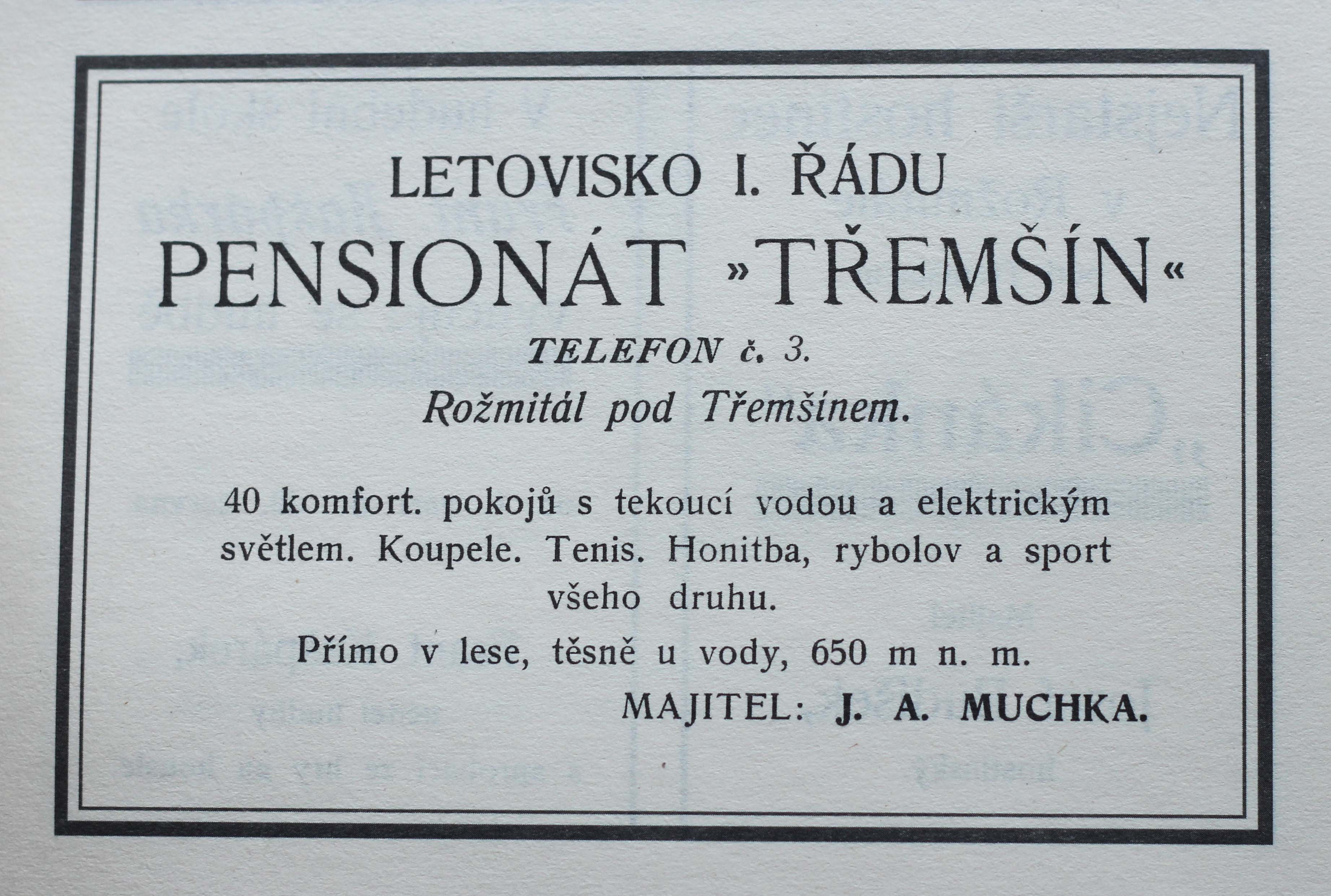 Dobový inzerát Penzion Třemšín